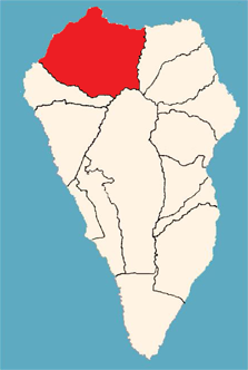 localización de la villa de garafía en el mapa de la palma